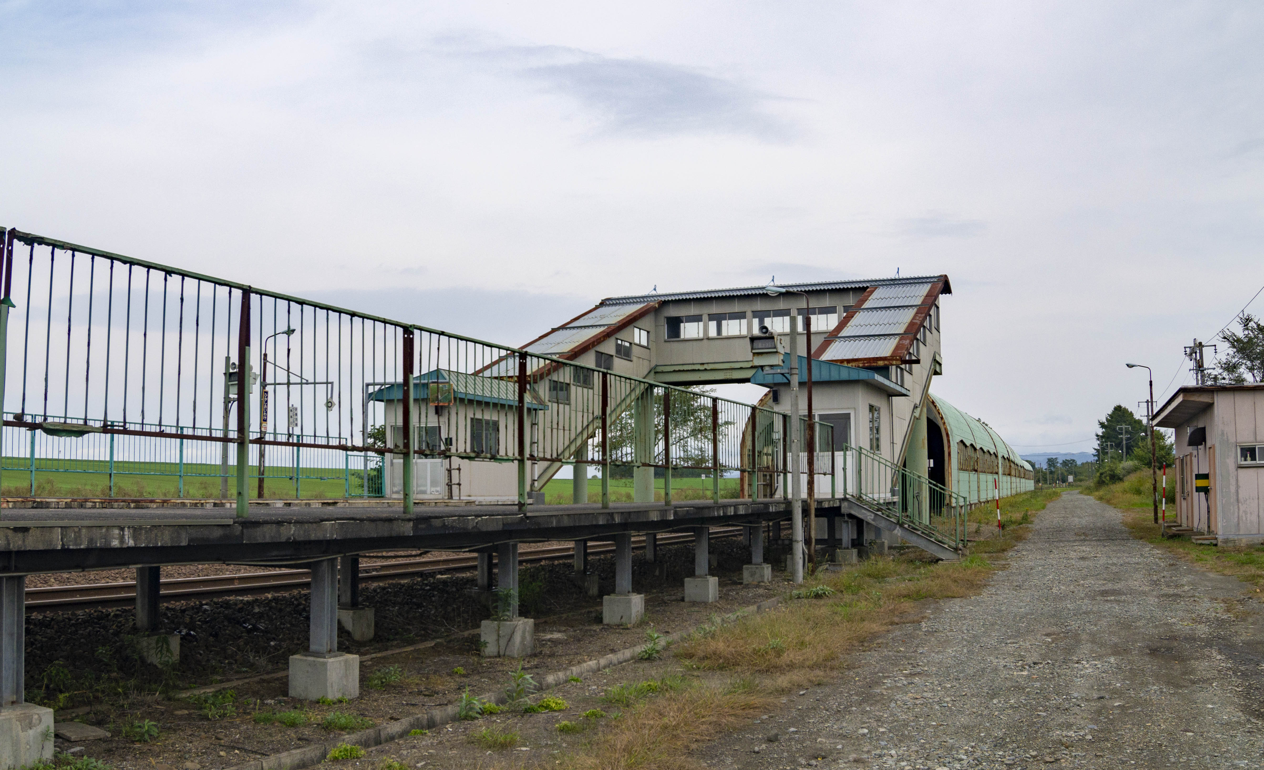 北海道旅客鉄道石勝線東追分駅（現東追分信号場）全景